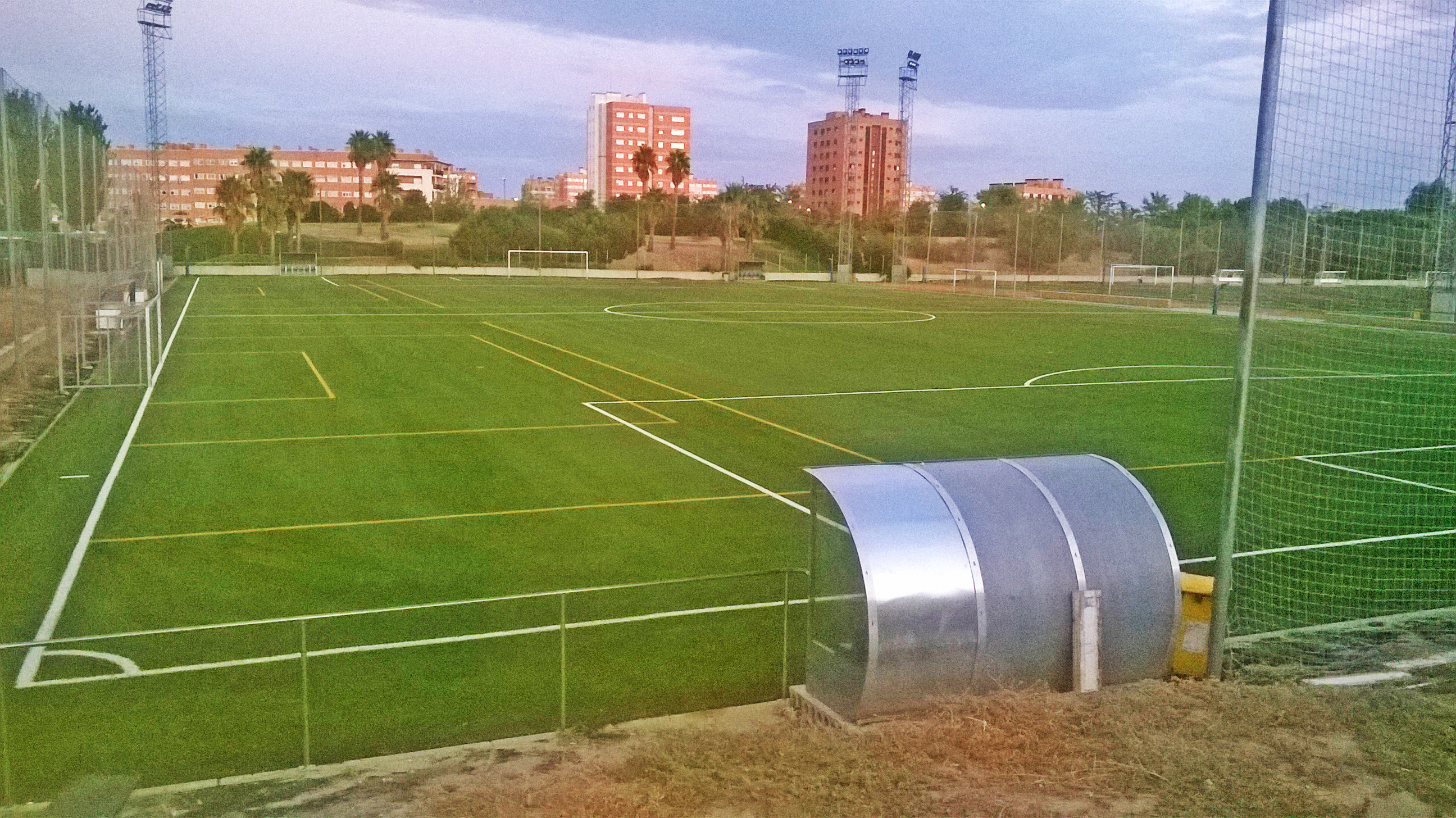 Uno de los campos de futbol del complejo deportivo Alfredo di Stefano en Parla